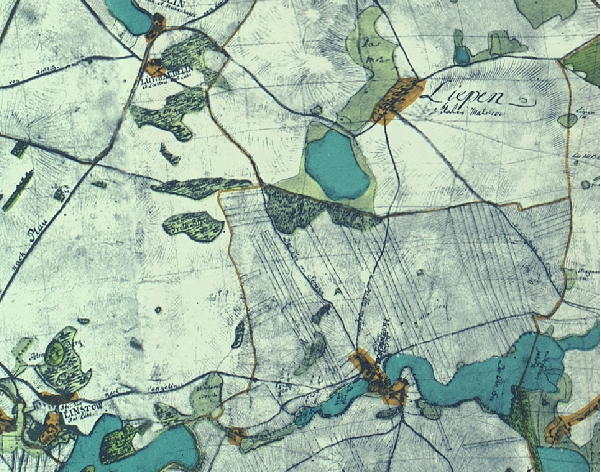 Ausschnitt aus der Karte Mecklenburgs von Carl Friedrich von Wiebeking.